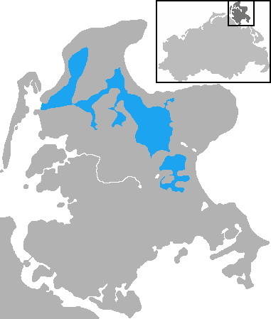 Mecklenburg-Vorpommern, Nordrügener Bodden Bay (marked blue)